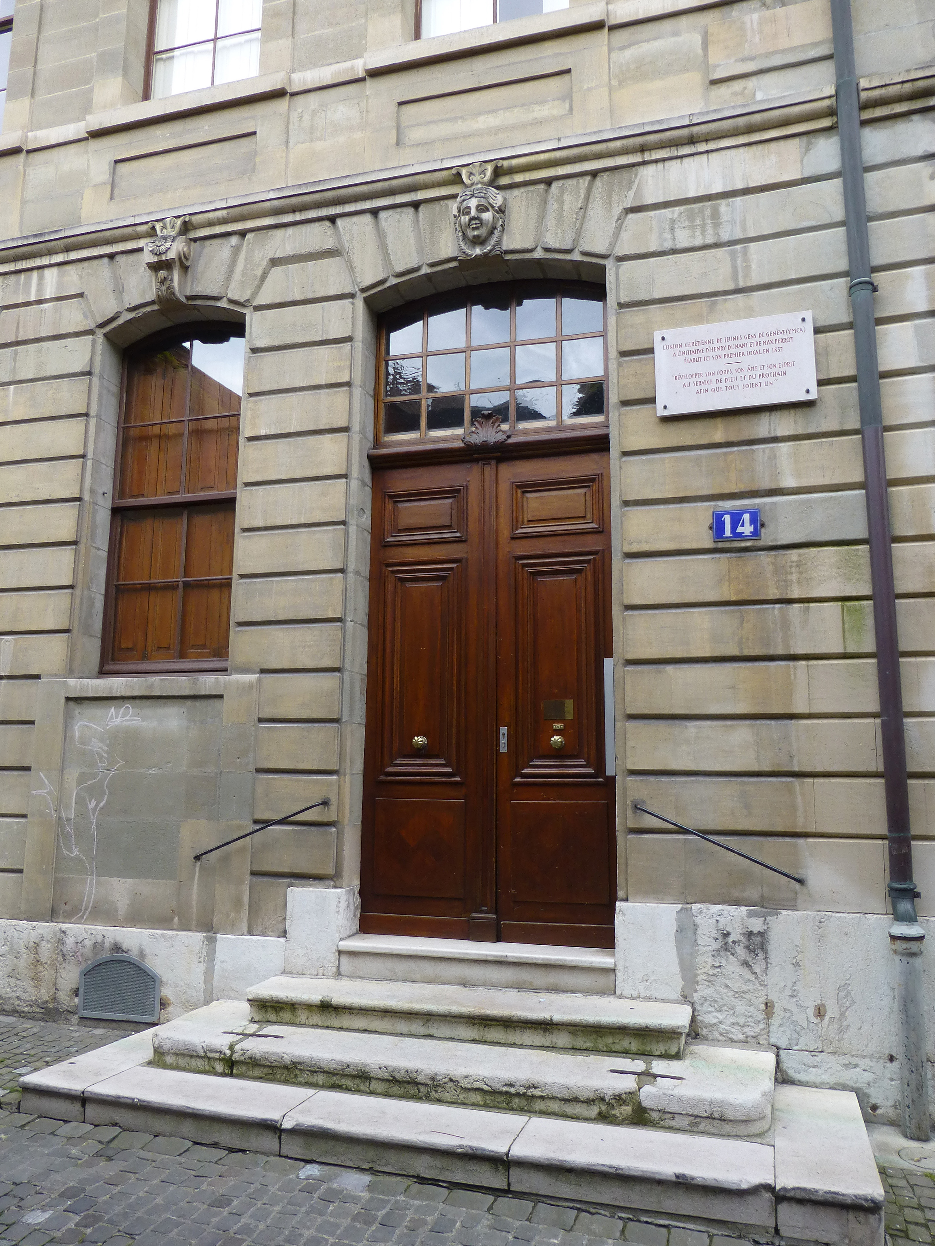 Genève (Suisse) : "L'Union chrétienne de jeunes gens (YMCA) à l'initiative d'Henry Dunant et de Max Perrot établit ici son premier local en 1852".